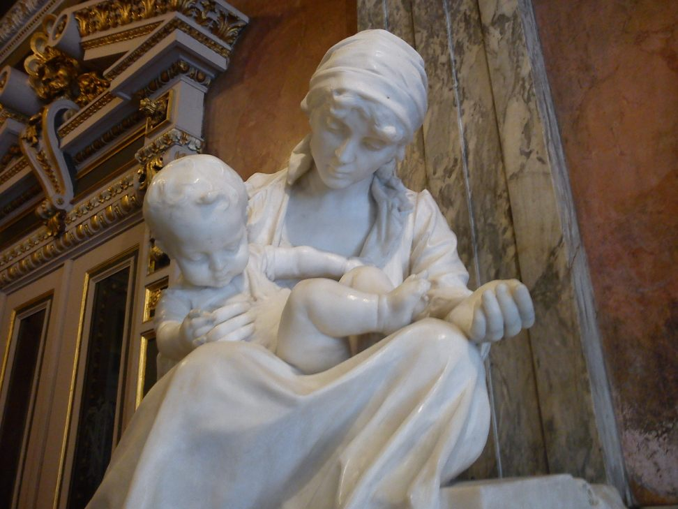 Los héroes de la miseria (1908), obra escultórica en mármol, de Juan Ramón Bonilla, ubicada en el vestíbulo del Teatro Nacional de Costa Rica.